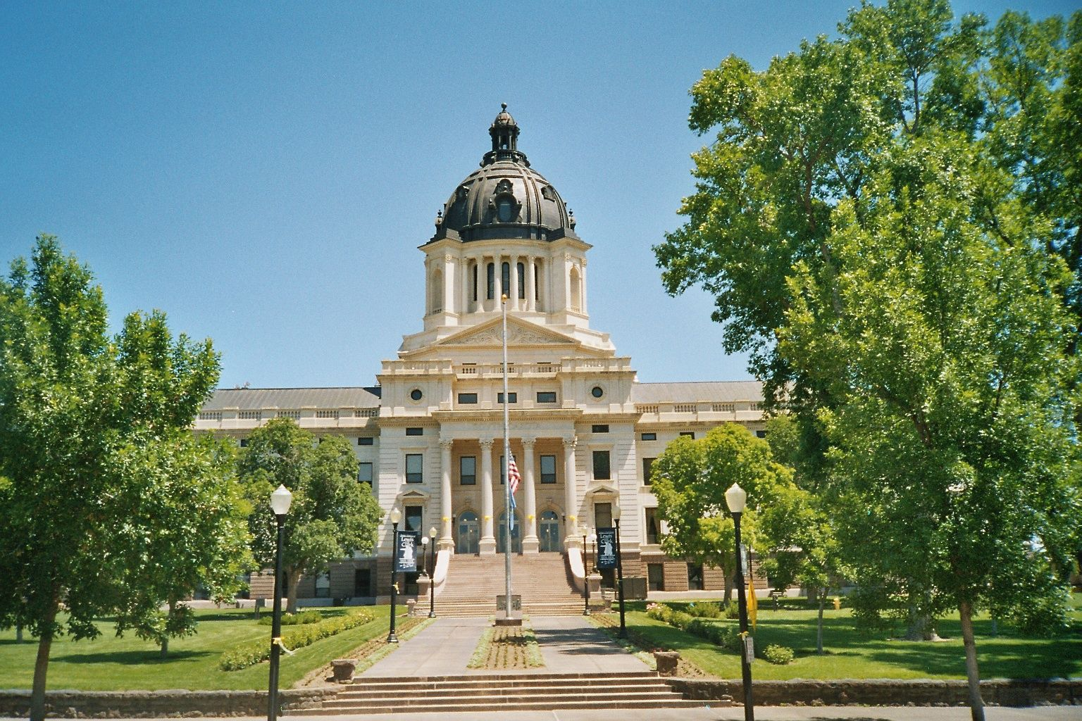 Das Capitol in Pierre South Dakota, eigenes Foto aufgenommen im Juni 2004 Fotograf R.Blauert